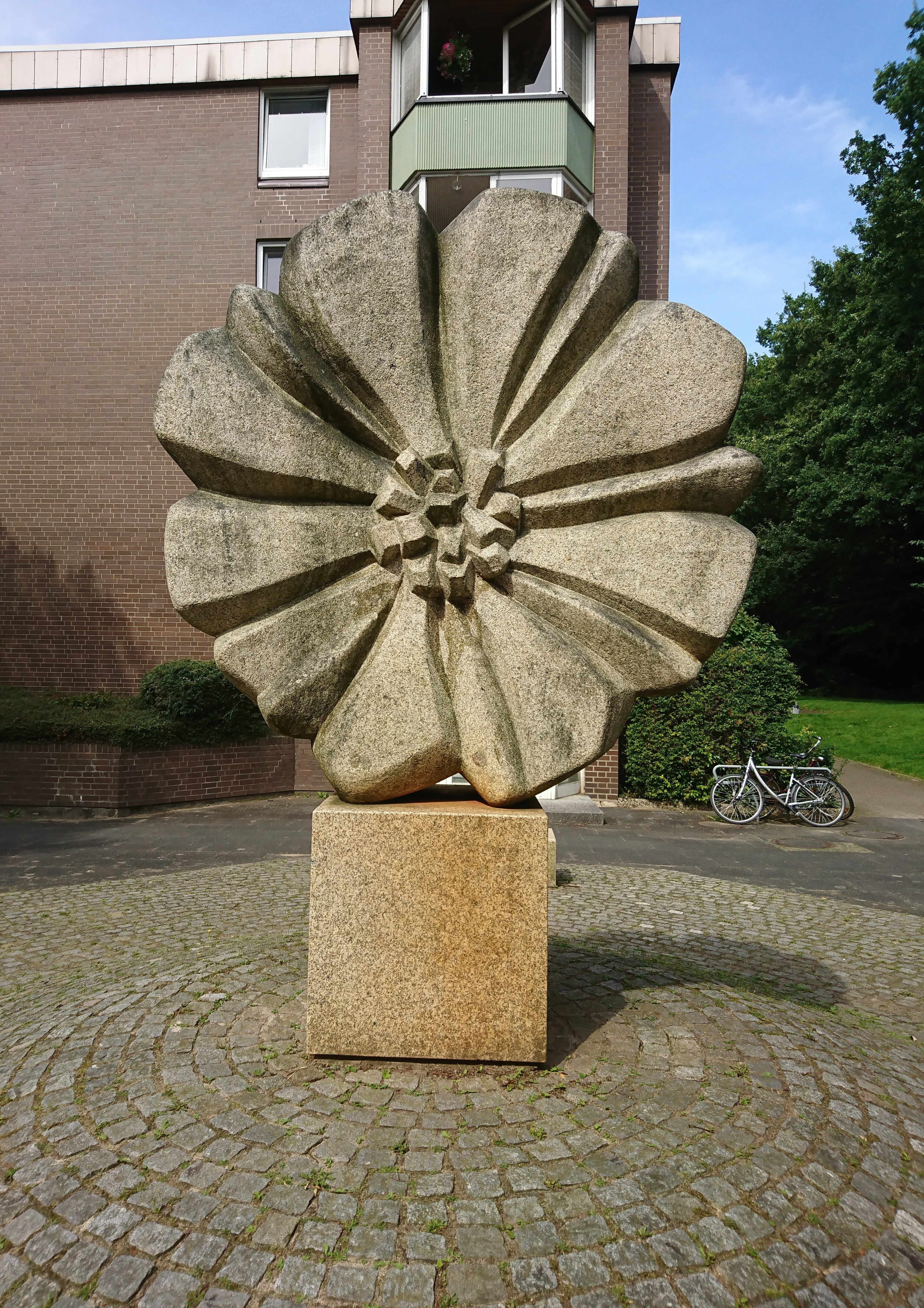 Steinblume von Maria Pirwitz, Wördenmoorweg 57. Reinersreuther Granit, Höhe: 218 cm, Eigentümer: meravis (vorher DAWAG). Aufgestellt 1982